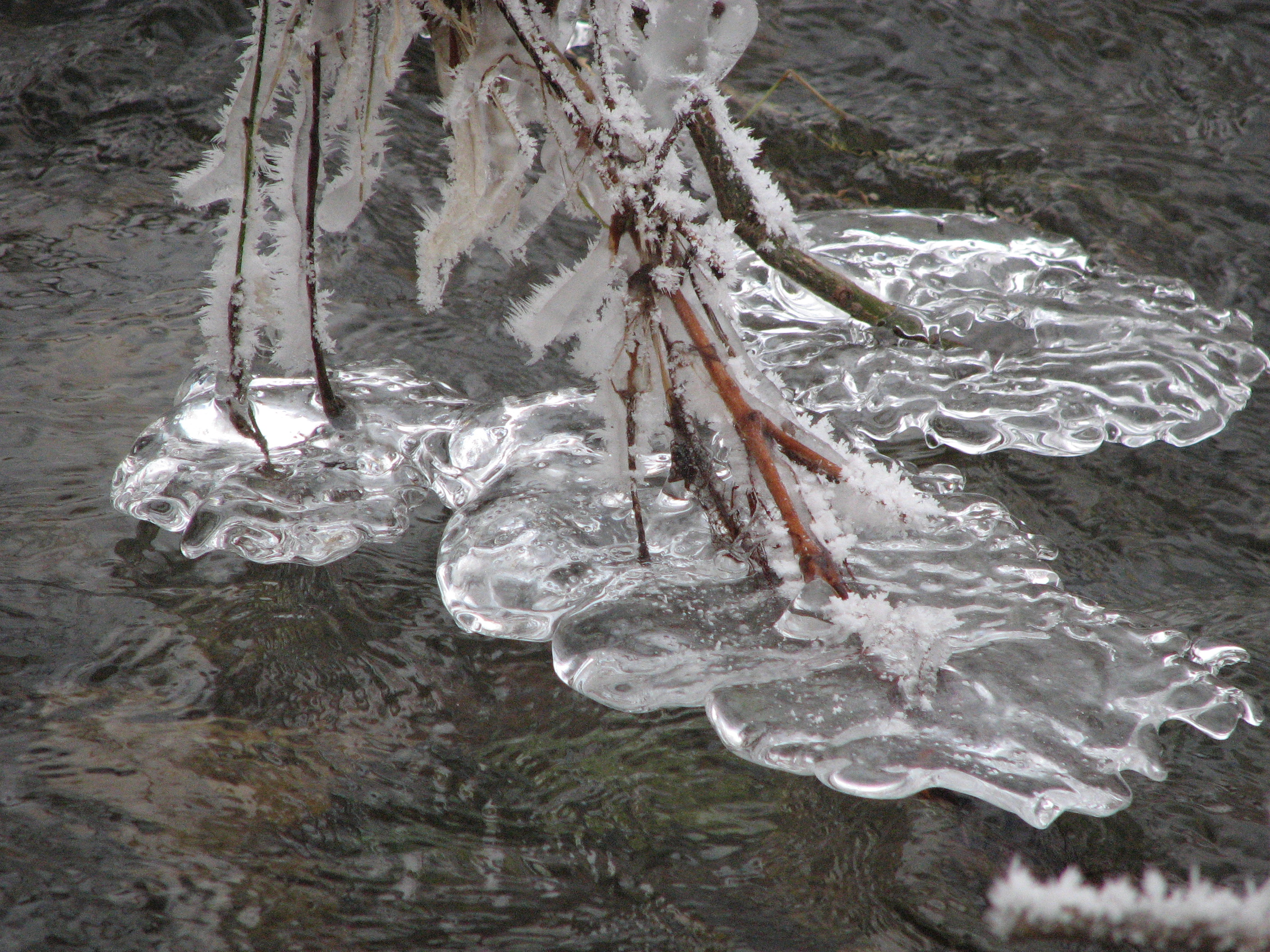 Branches prisent dans les eaux glacées de la Lauch à hauteur de Herrlisheim près de Colmar